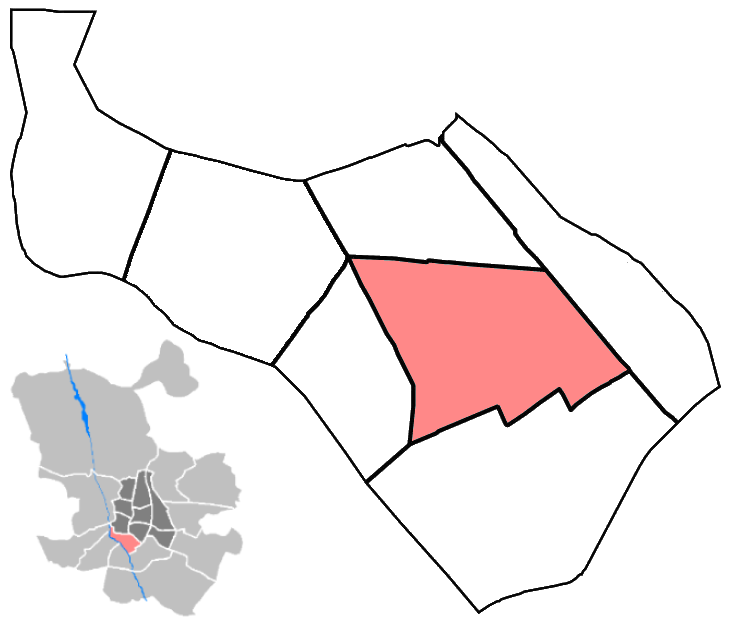 Mapa del barrio de Delicias. Arganzuela. Madrid. España